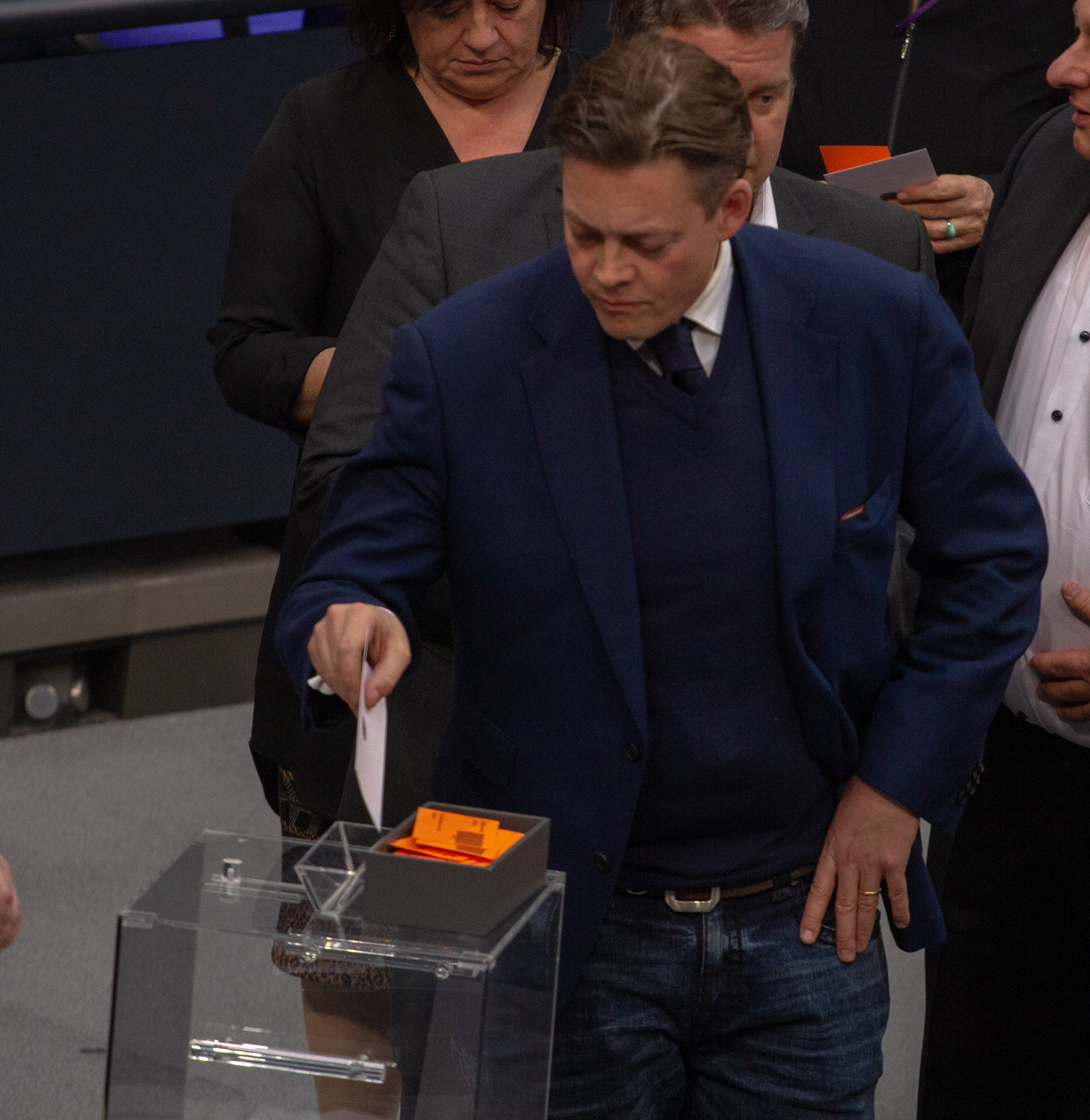 Konstantin von Notz, Mitglied des Deutschen Bundestages, während einer Plenarsitzung am 11. April 2019 in Berlin.